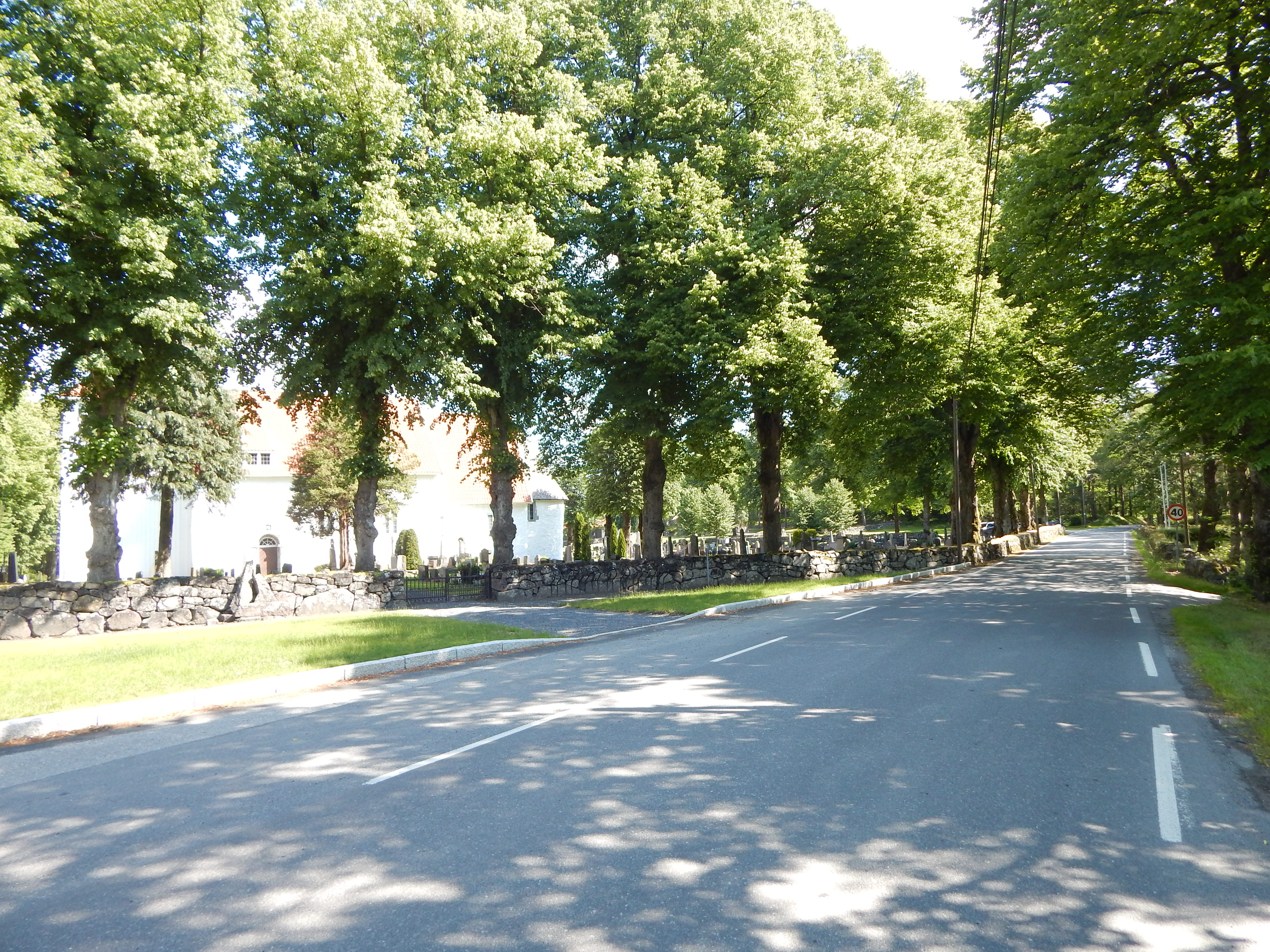 Fylkesvei 33 på sørsiden av Fjære kirke